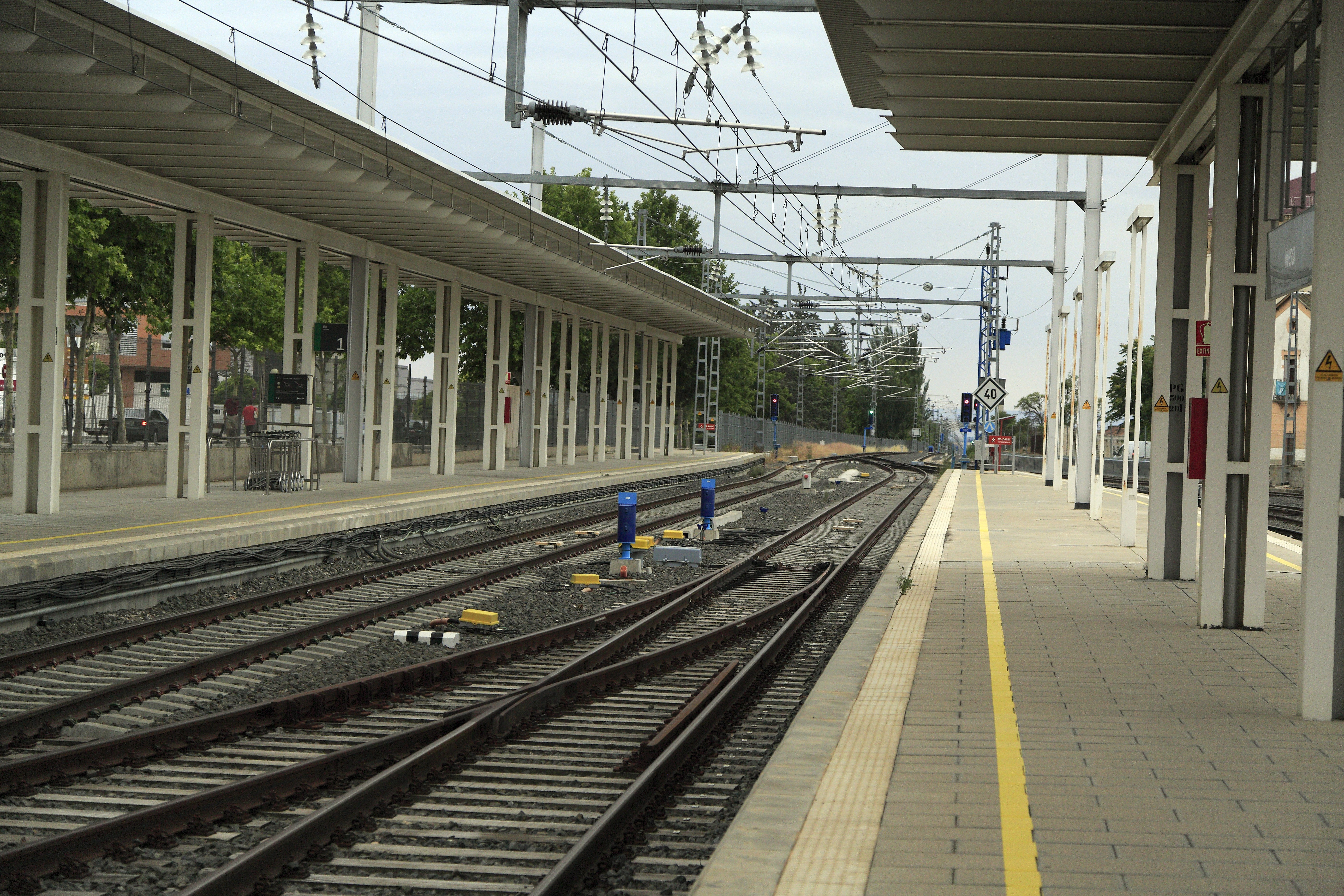 Bahnsteiggleise in Regelspur, nur diese sind mit Fahrleitung überspannt. Sie führt 25kV, mangels Verbindung in Tardienta ist sie nur mit Regelspurfahrzeugen nutzbar. Eine Umsetzmöglichkeit besteht mit den beiden Weichen im Vordergrund, doch ist damit die Nutzlänge der Bahnsteiggleise beschränkt.